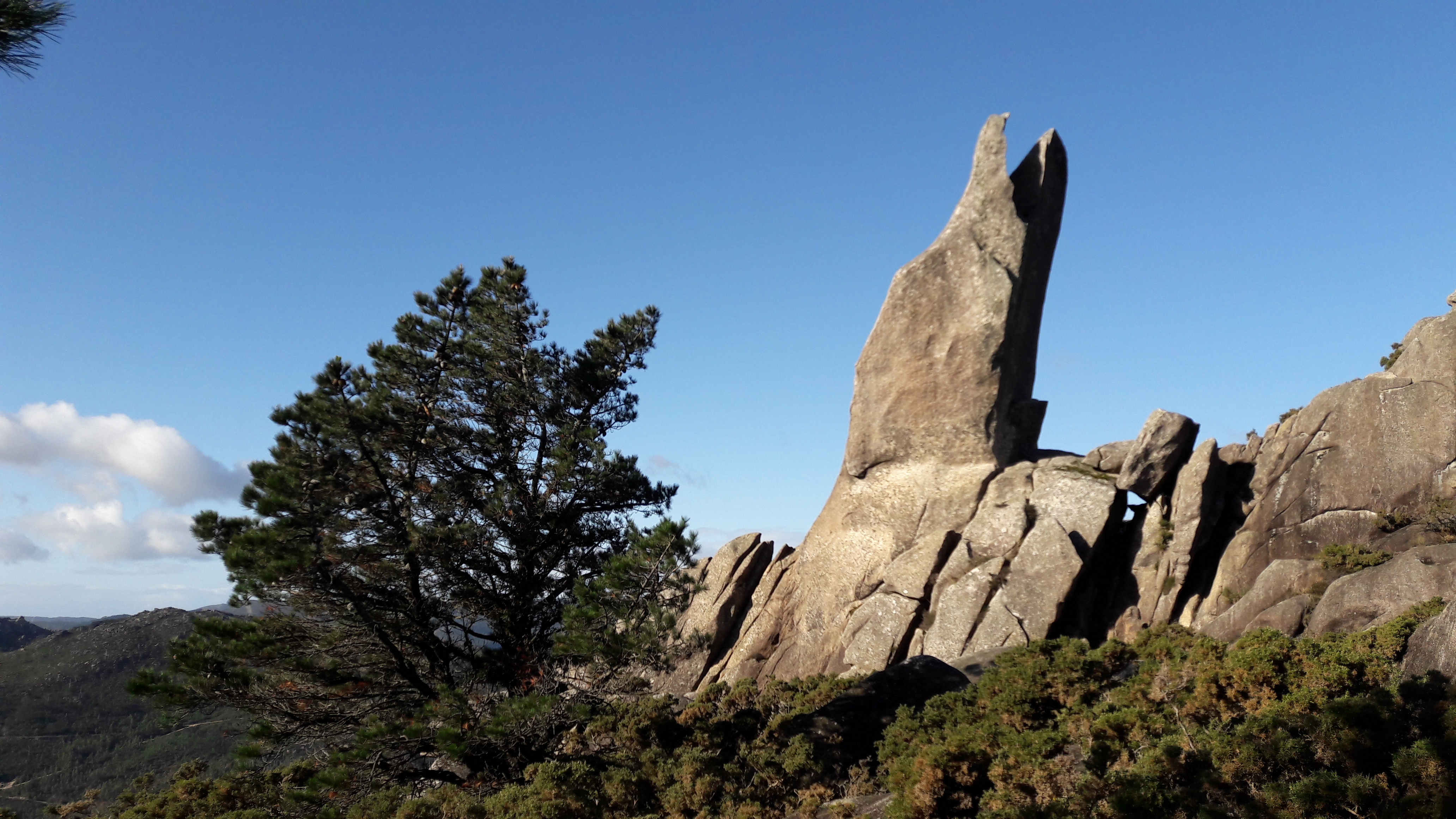 Bico do Castelo Grande, entre as parroquias de Esteiro (Muros) e O Freixo de Sabardes (Outes)